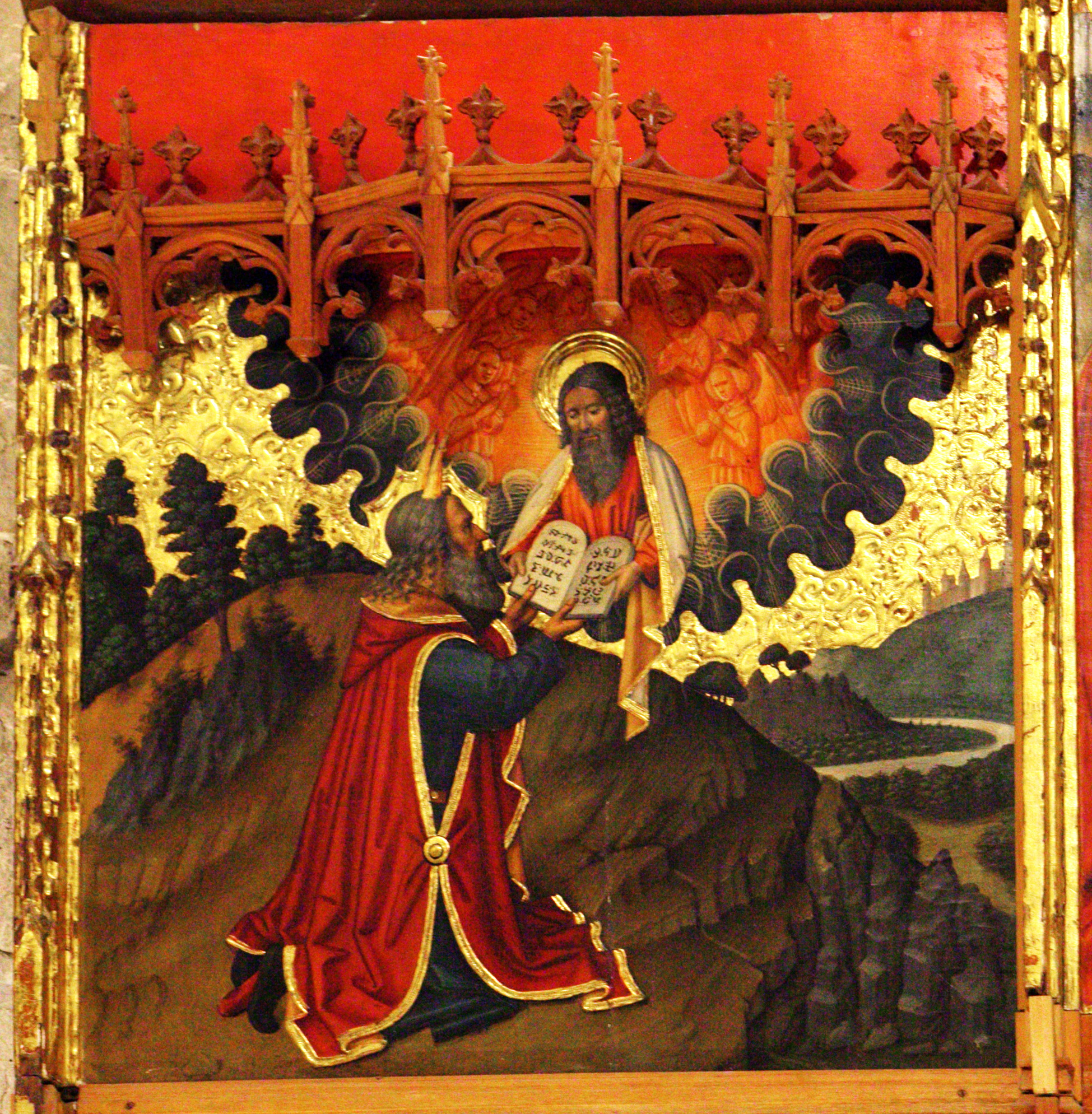 Taula del lliurament de les Taules de la Llei a Moisès del “Retaule de la transfiguració” de Jaume Huguet a la sala de l´antic refectori dels canonges, de la catedral de Tortosa. La seva ubicació original era a la capella central de la girola, darrera l'altar major.